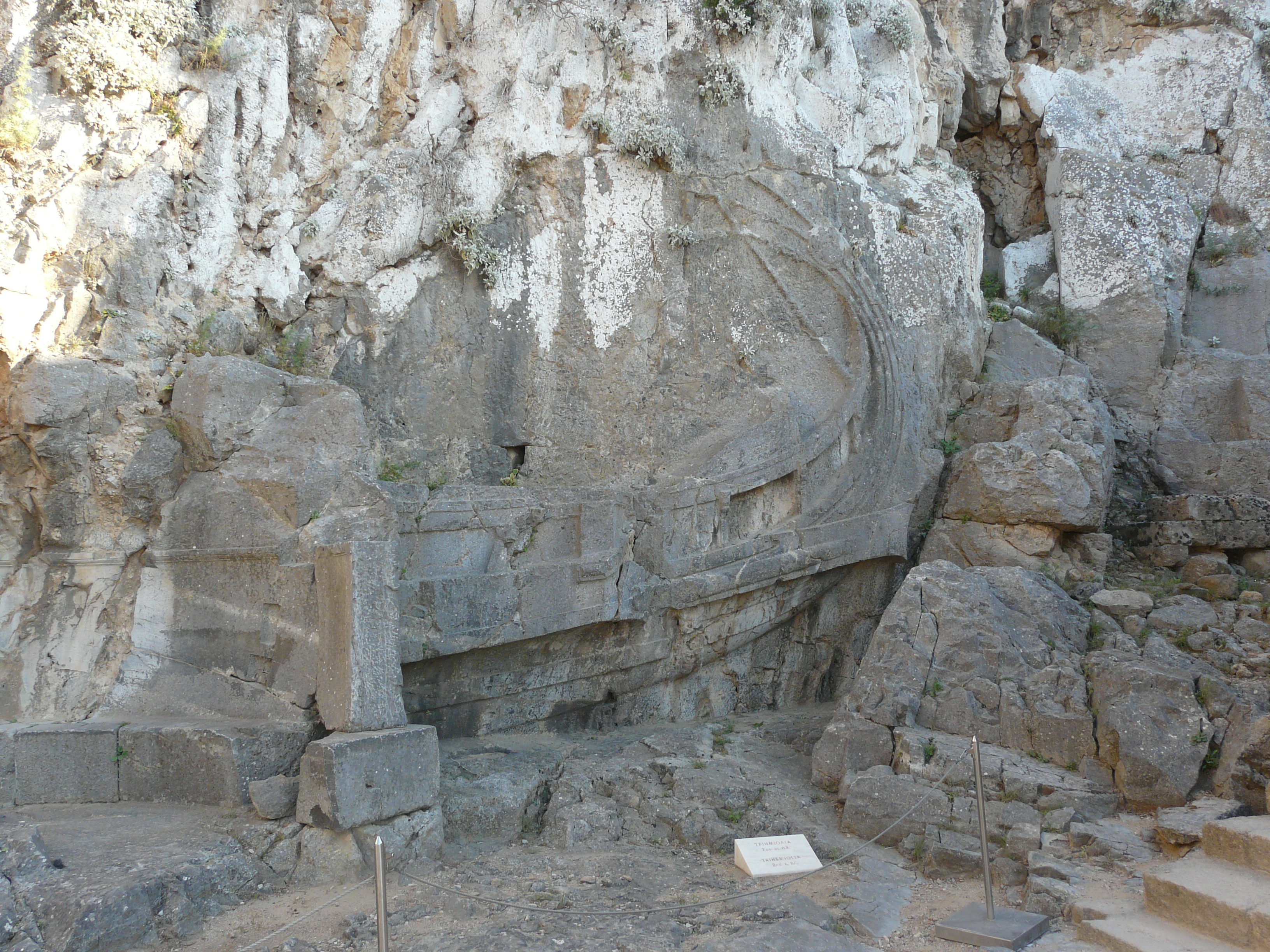 Lindos, Rhodes